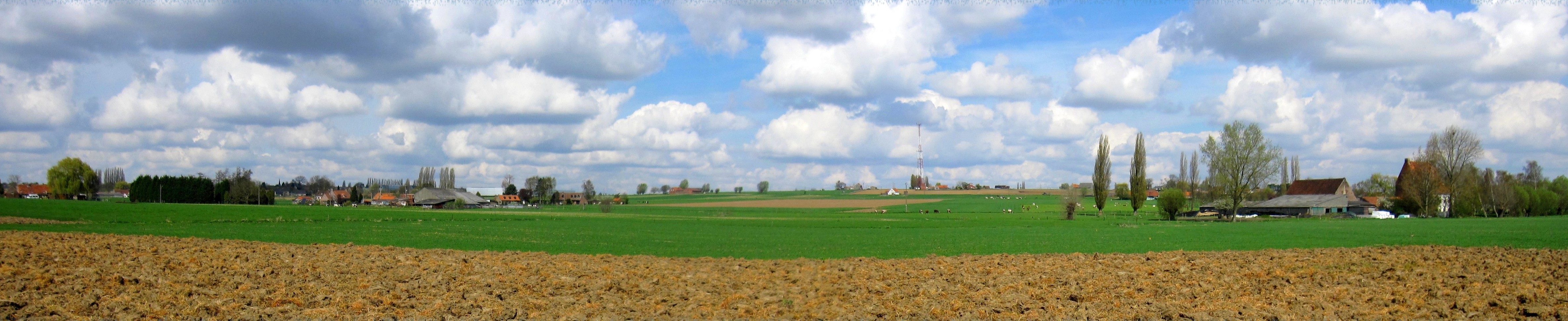 Herseaux